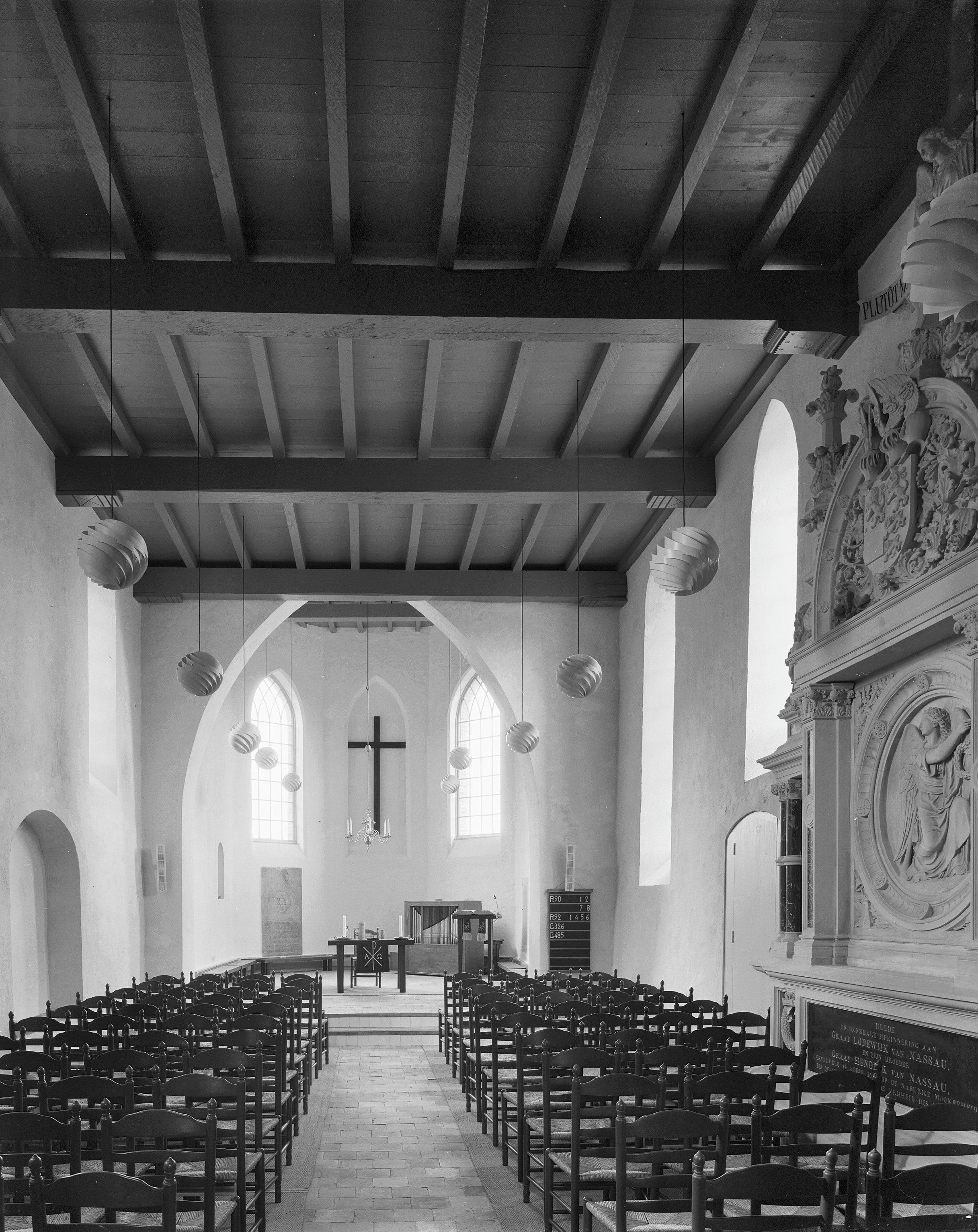 N.H.Kerk: interieur naar het oosten